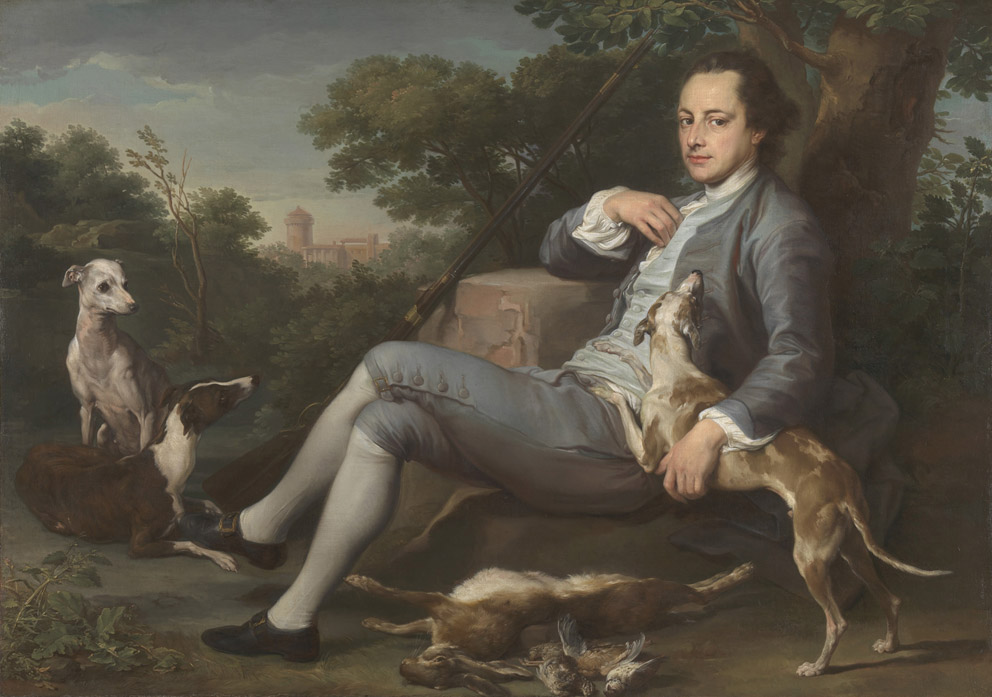 Portrait de Sir Humphry Morice par Pompeo Batoni (1761 - 1762)